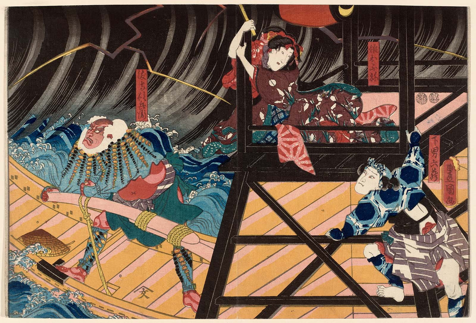 Kabuki Scene from "Shinrei Yaguchi no Watashi", Act 4 （『神霊矢口渡』 四段目より）